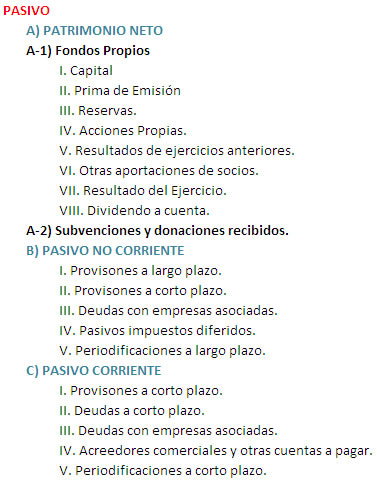 Estructura del Balance de Situación PGC (Activo)